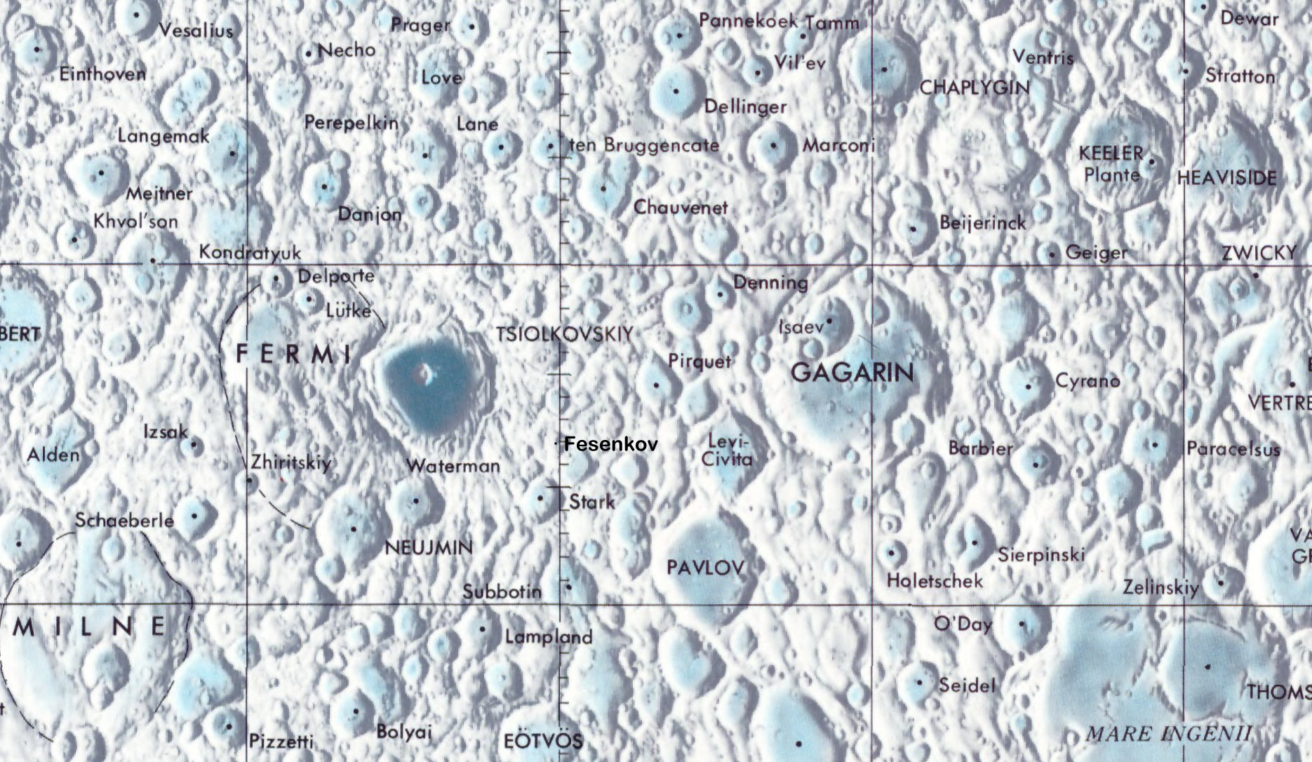 Cráter lunar Fesenkov. Localización. (Mapa Misión Clementine)